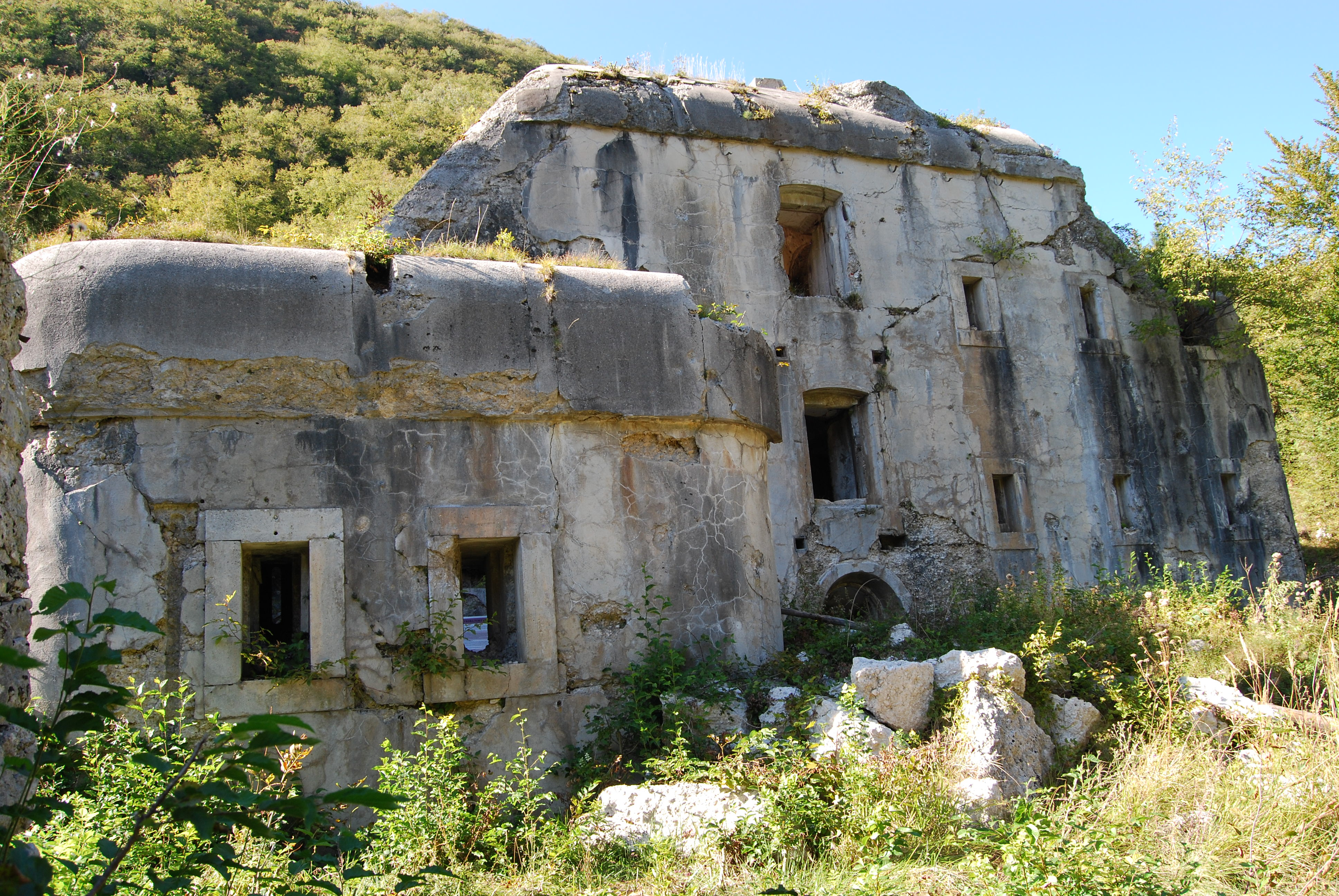 Zunanjost utrdba.